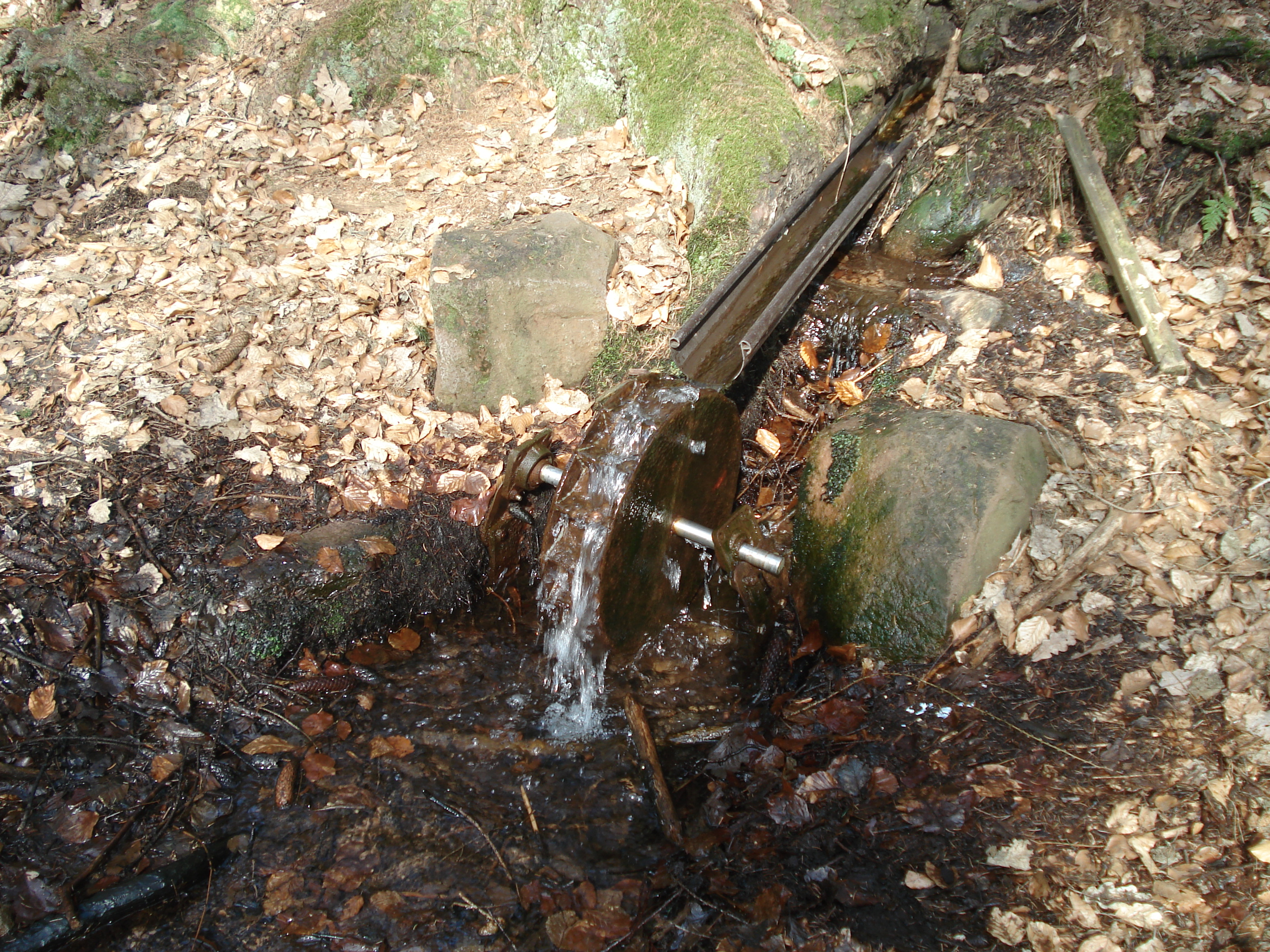 Der Herzborn am Herberg